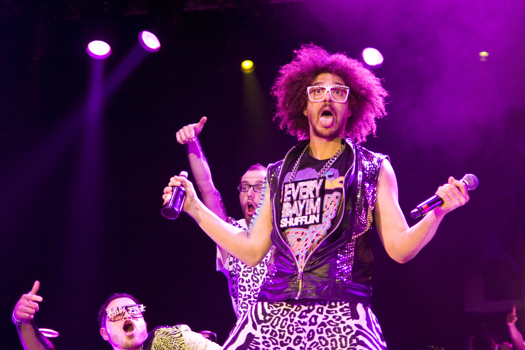 Fotos: Rosario López